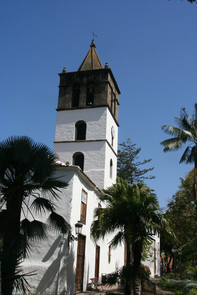 Iglesia de San Marcos, Icod de los Vinos, Tenerife, Canarias